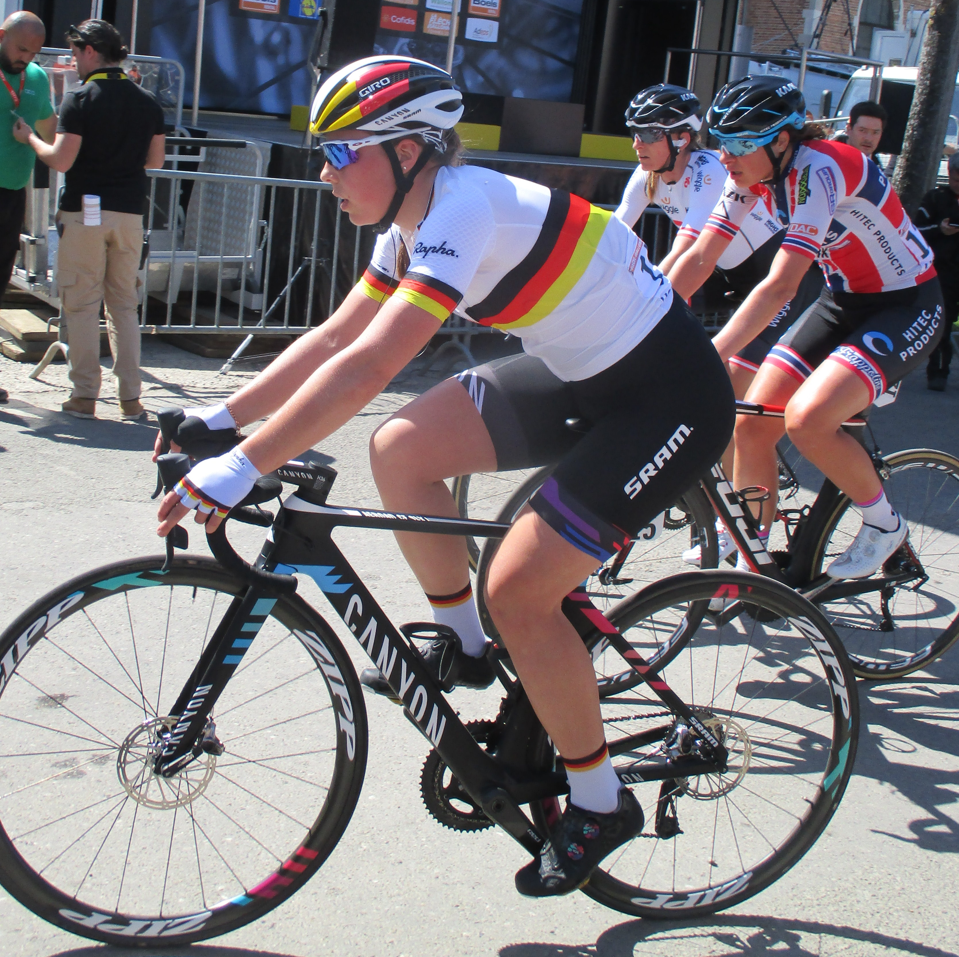 Finish van de Waalse Pijl 2018 op de Mur van Huy.